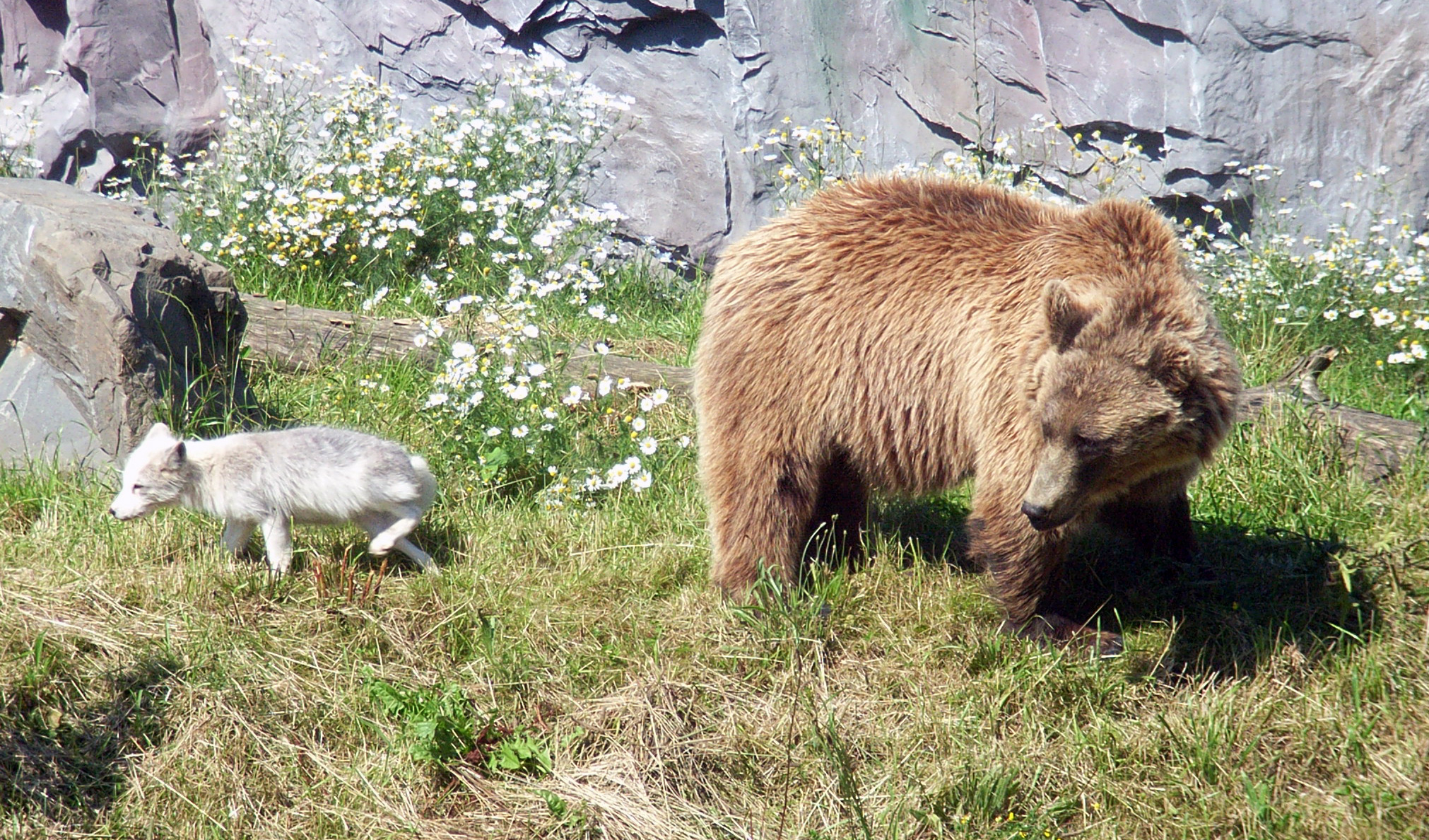 Alopex lagopus, Ursus arctos middendorffi, ZOOM Erlebniswelt Gelsenkirchen